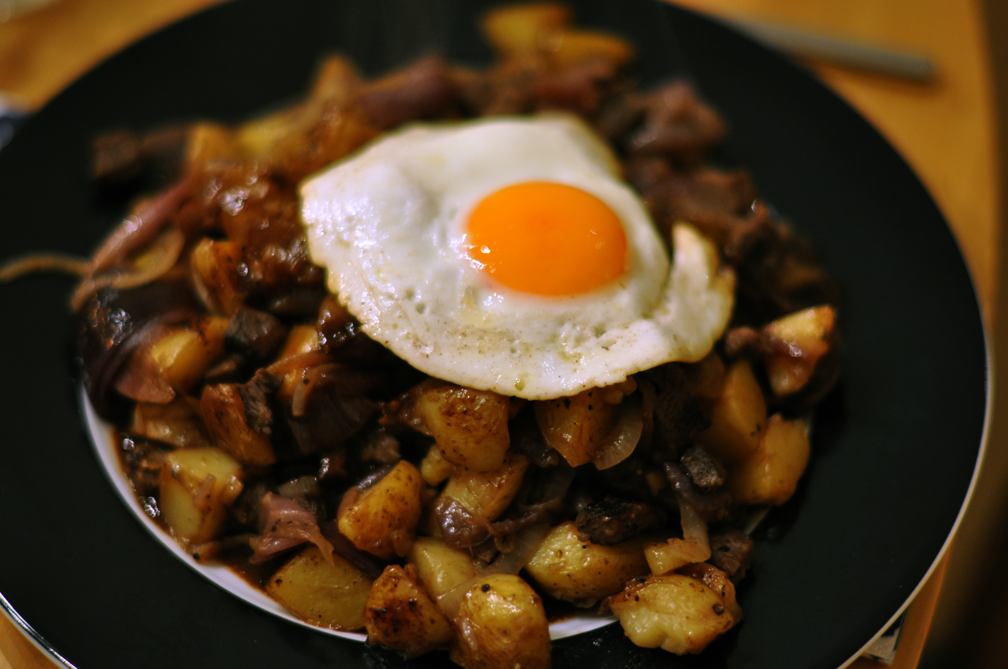 Biksemad med spejlæg